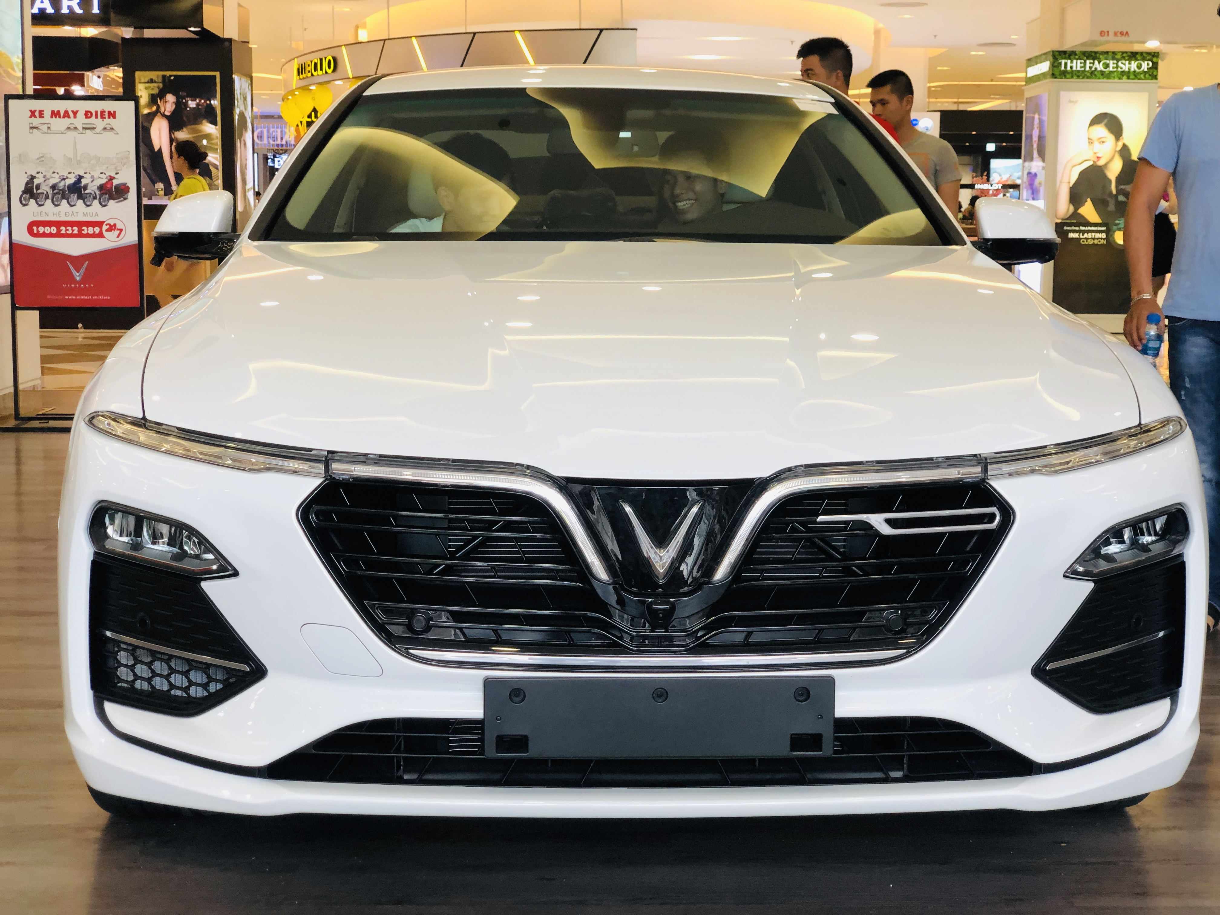 Mặt trước xe VF Lux A2.0 trắng tại Times City